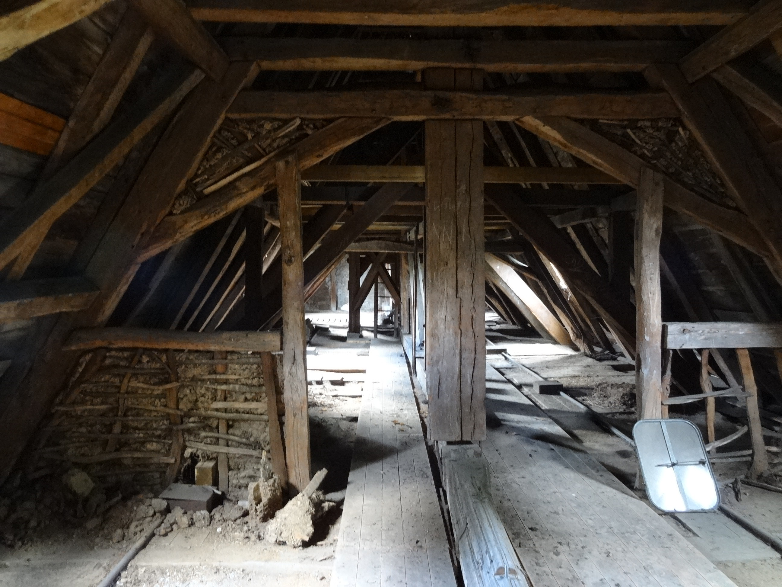 Alte Kirche (Watzenborn-Steinberg)